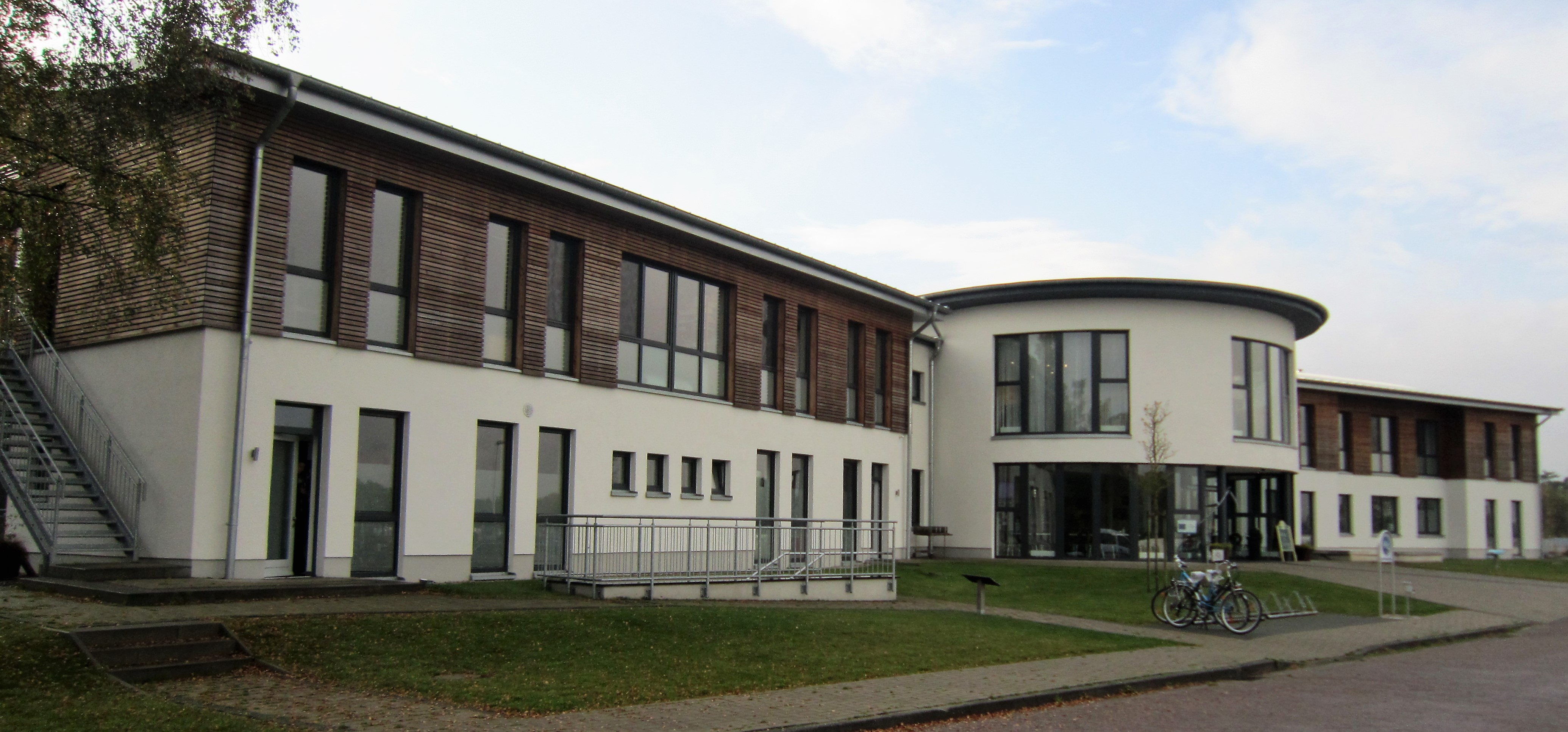 Vorderansicht des Europäischen Fachzentrums Moor und Klima (EFMK) in Ströhen (Gemeinde Wagenfeld im Landkreis Diepholz / Niedersachsen)